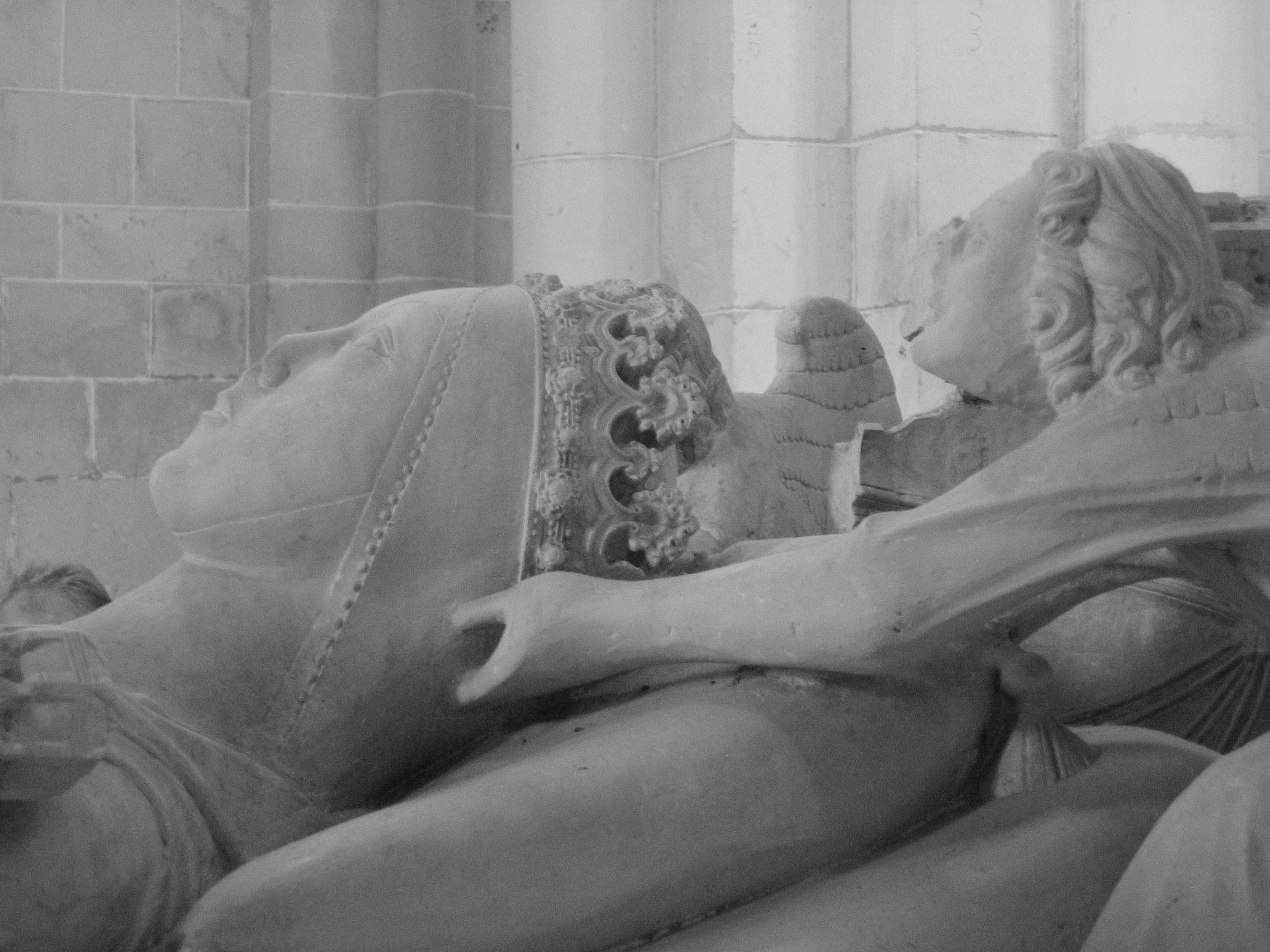 Ines de Castro Kloster Alcobaca